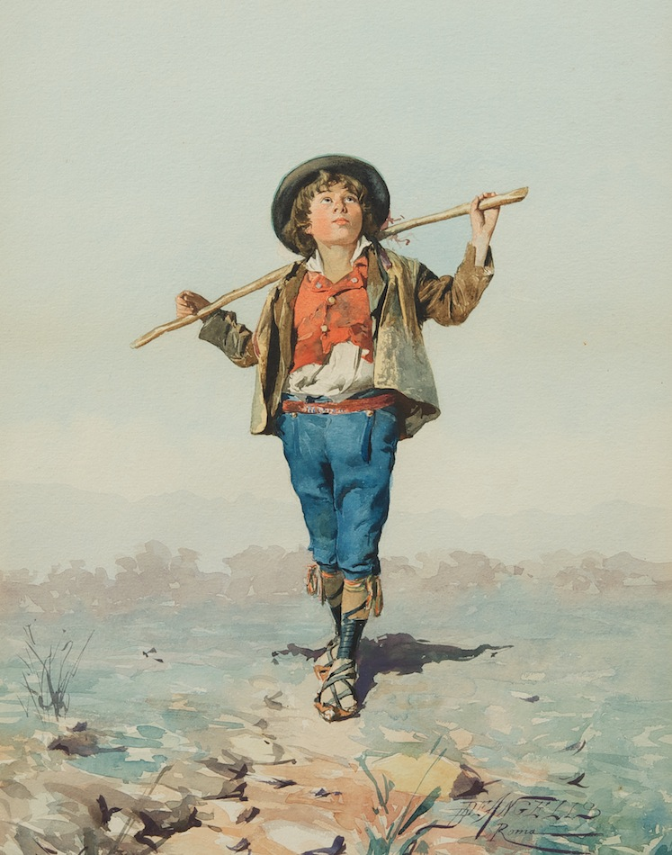 Jongens portret in waterverf